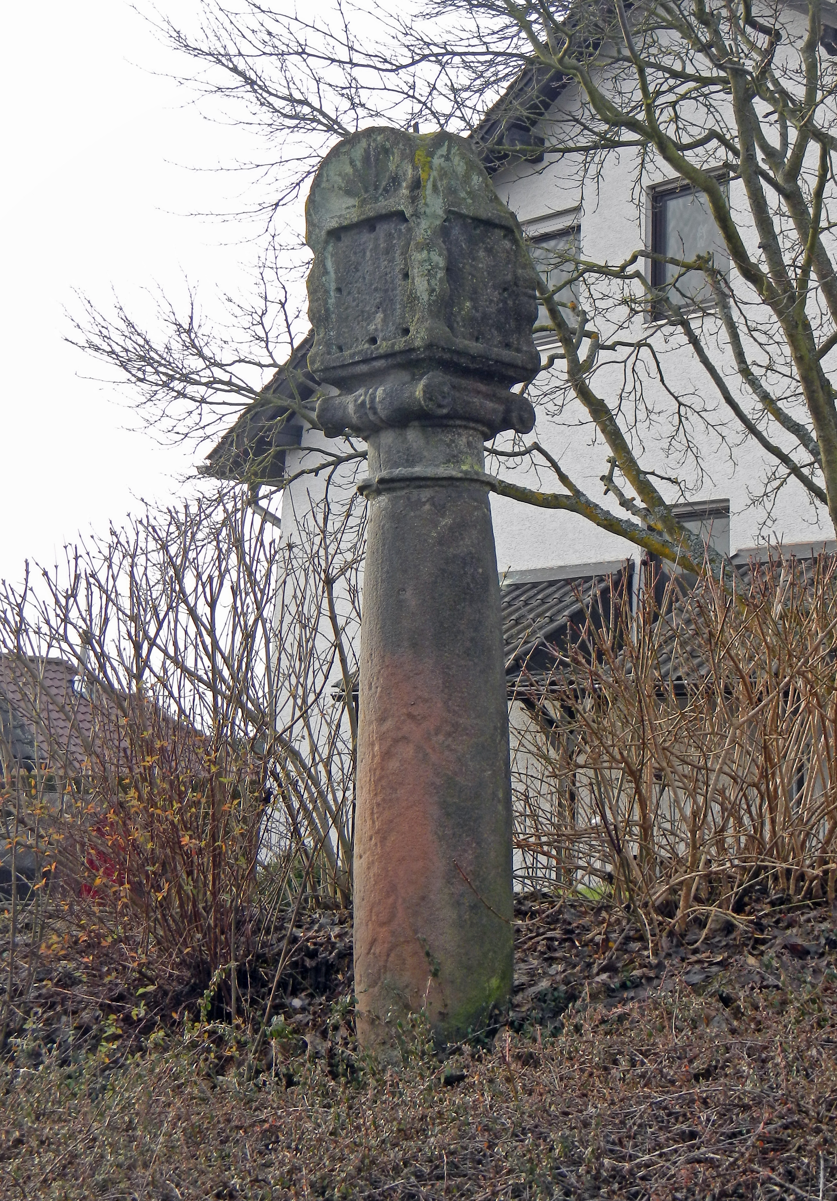 Martersäule, bez. 1850 in Röhrach (Gemeinde Heßdorf) im Landkreis Erlangen-Höchstadt.